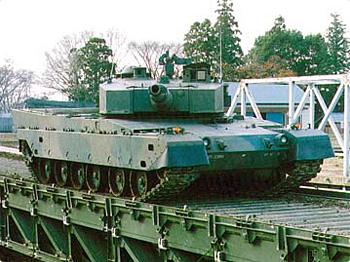 略称：MGB [全長]約42m [全幅]約4.0m [全重量]約58.5t [製作]（輸入）ウィリアムフェアリー社 パネル橋の後継器材として、平成9年度から装備化された。軽量で高強度の組み立て式橋梁であり、河川または地隙に迅速に架設し、人員・車両・戦車など を通過させることができる。施設器材隊に装備されている。